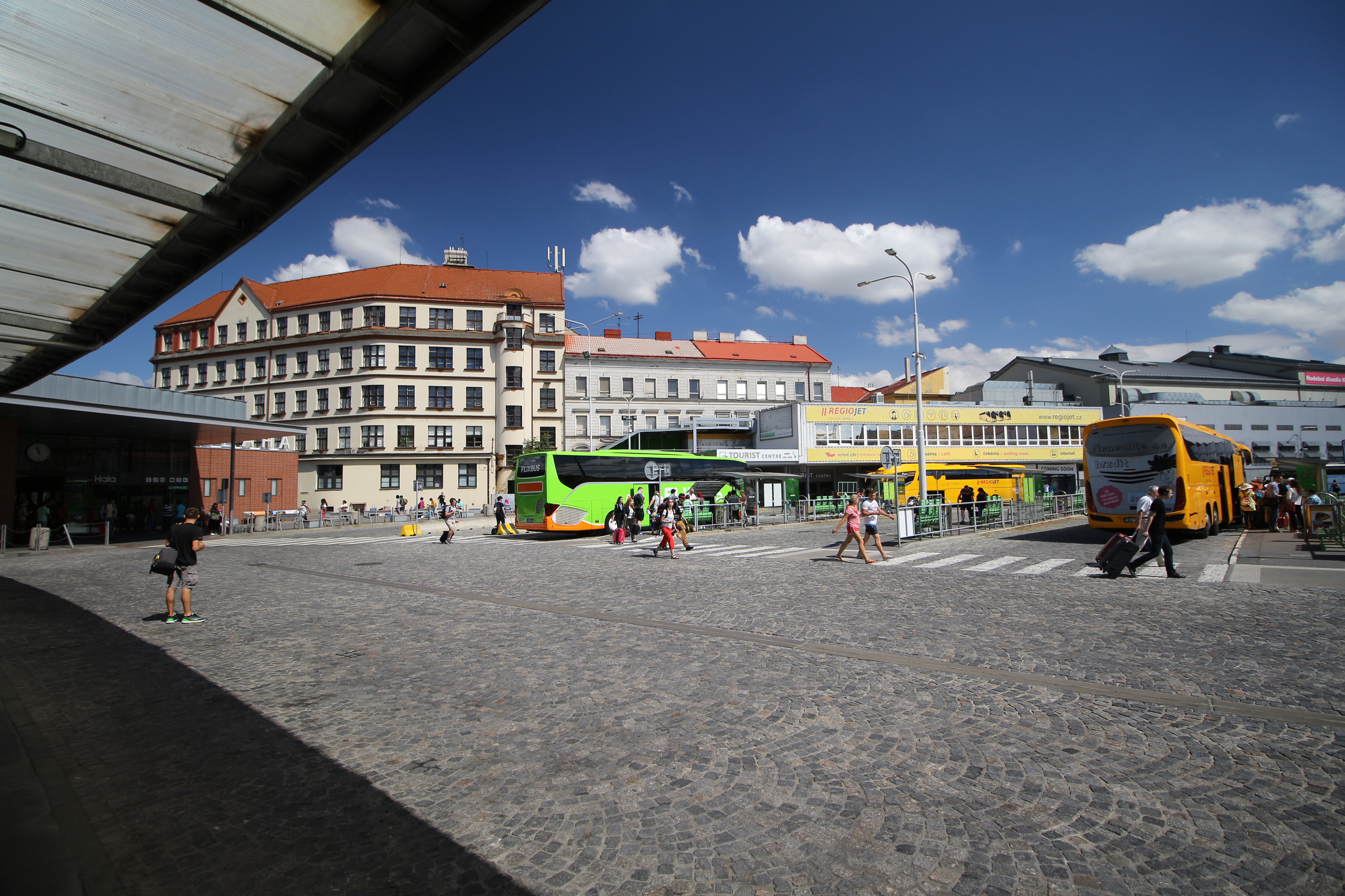 Praha Florenc